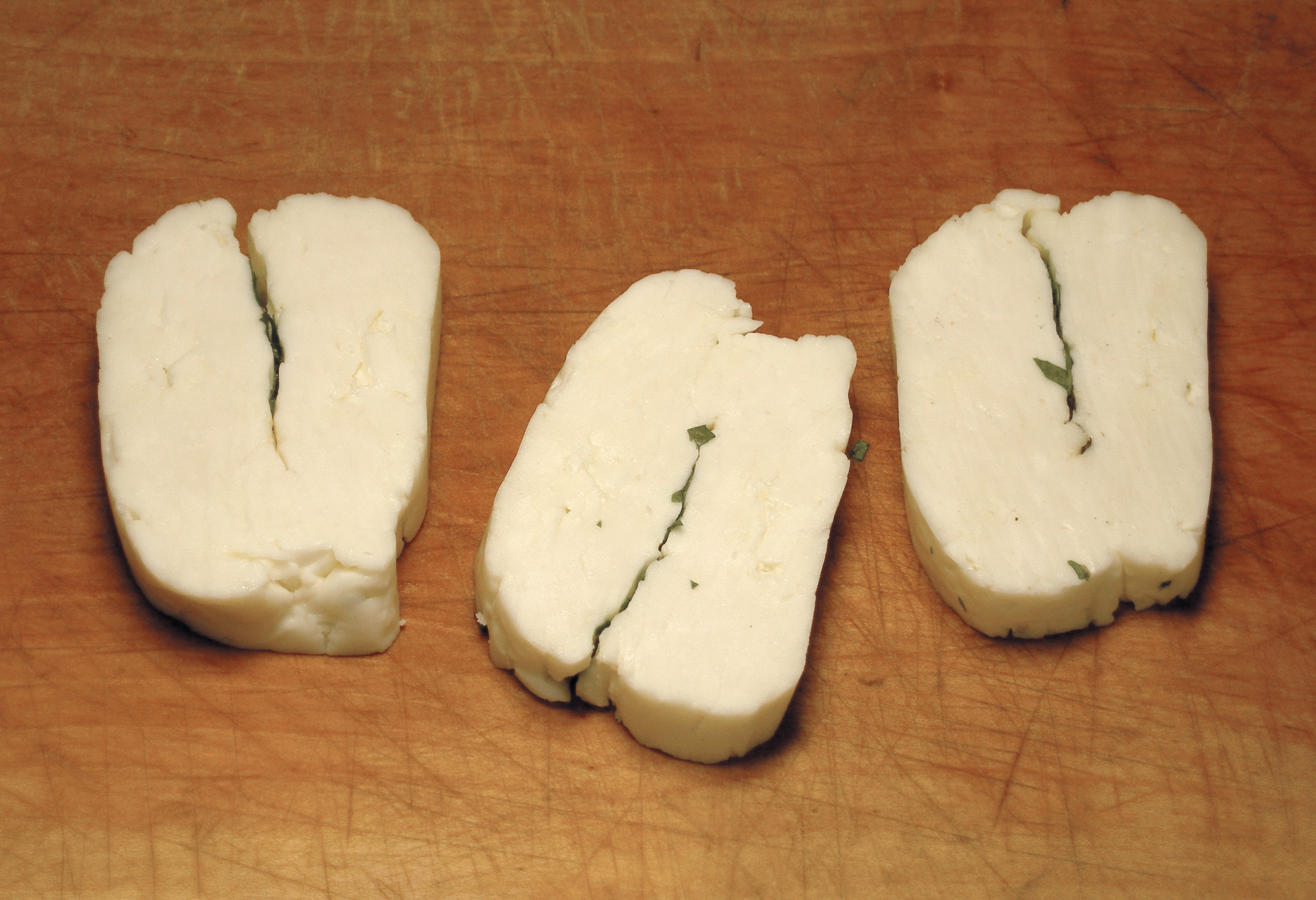 Geschnittener Halloumi mit dem typischen Spalt in der Mitte, ein Käse aus Zypern.